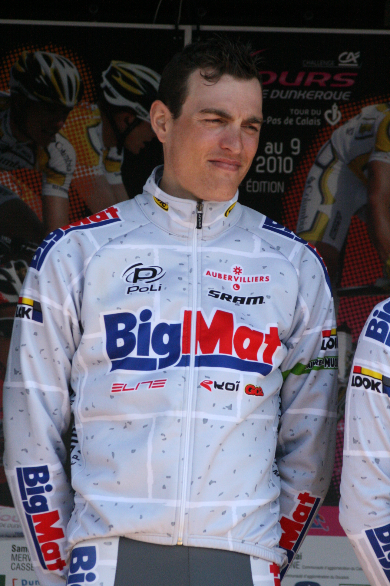 Niels Brouzes lors de la présentation des équipes des 4 jours de Dunkerque 2010